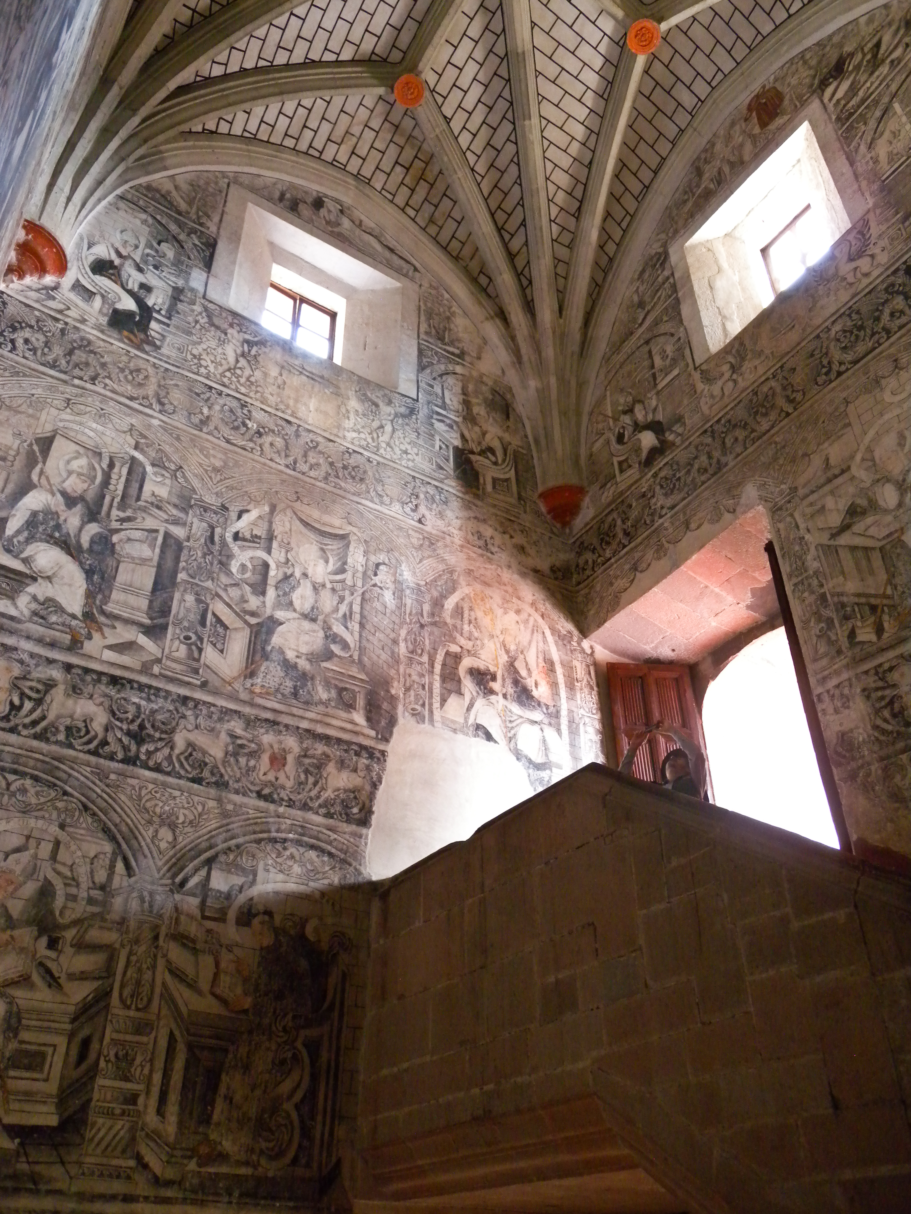 Convento de Actopan, Hidalgo.